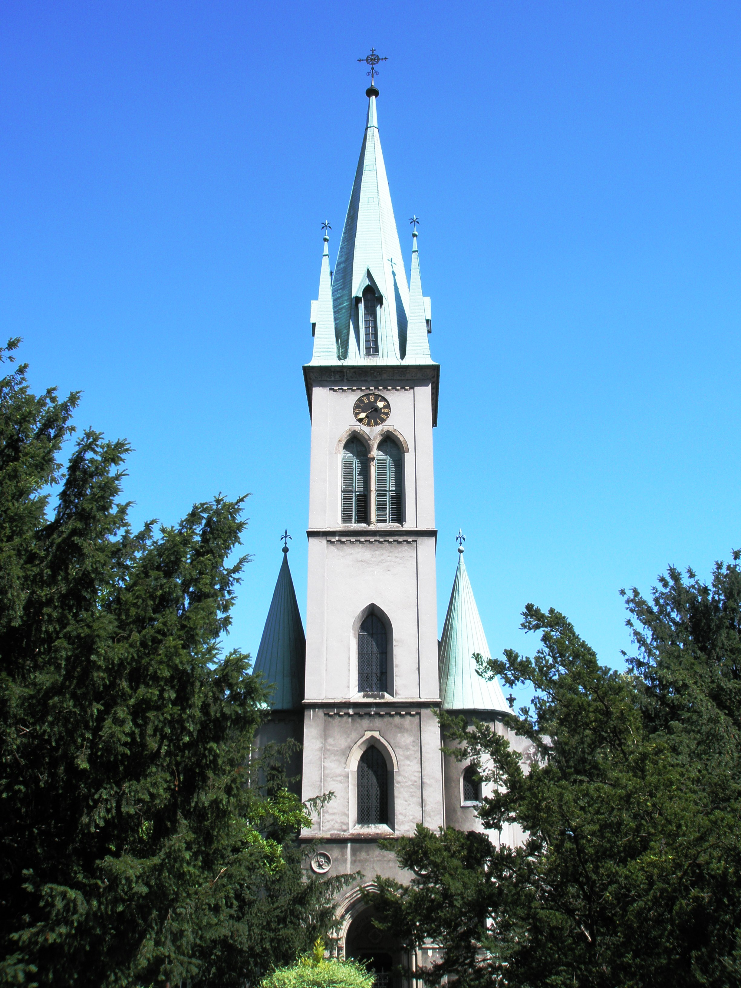 Katedra ewangelicka pw. Zbawiciela w Bielsku-Białej